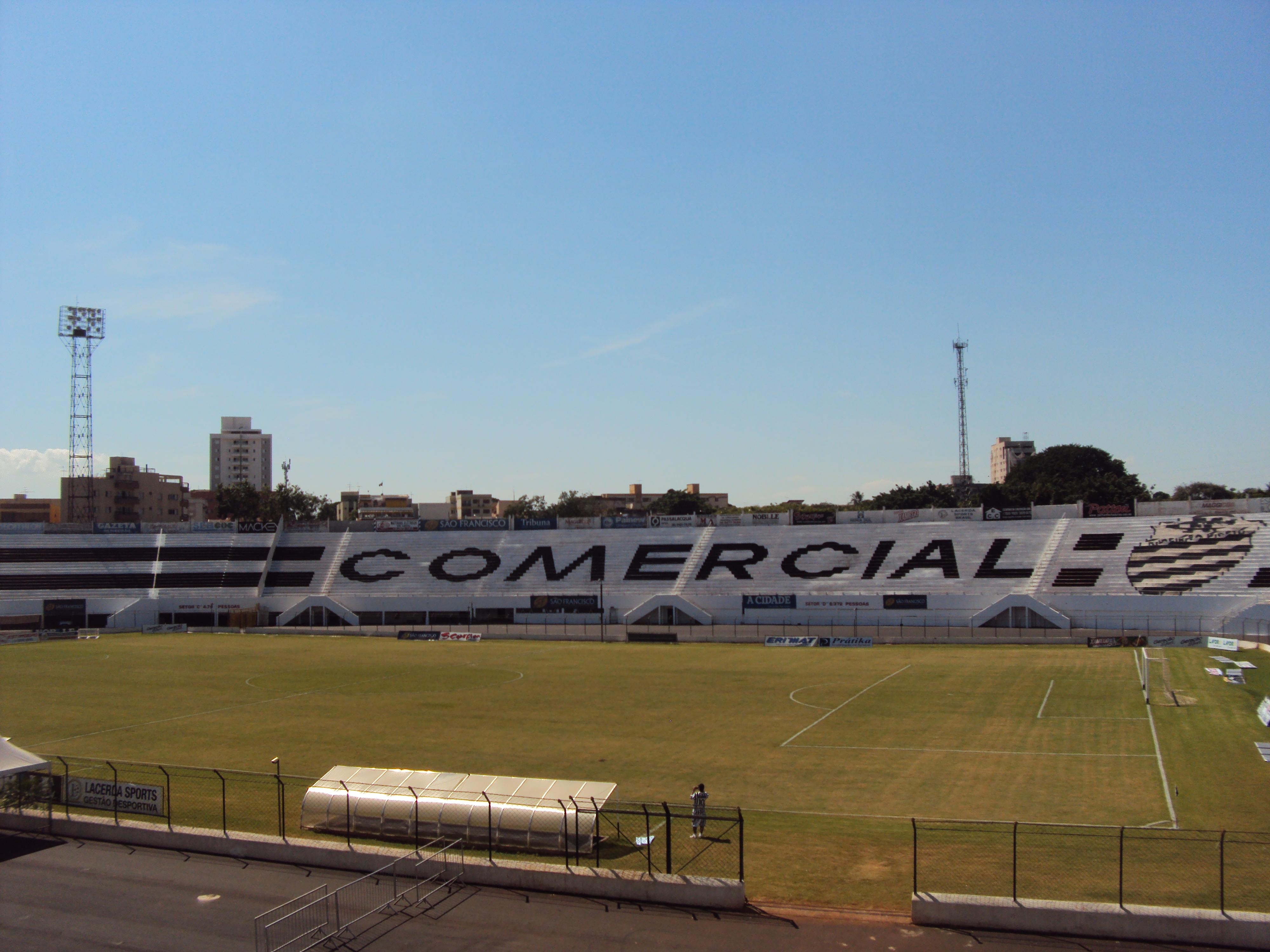 Estádio Dr. Fco de Palma Travassos - Jóia de Cimento Armado (La Bafonera)